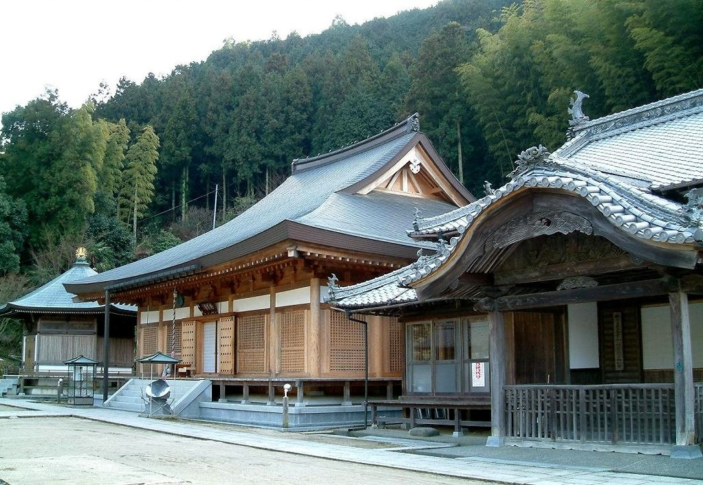 石鎚山極楽寺の本堂